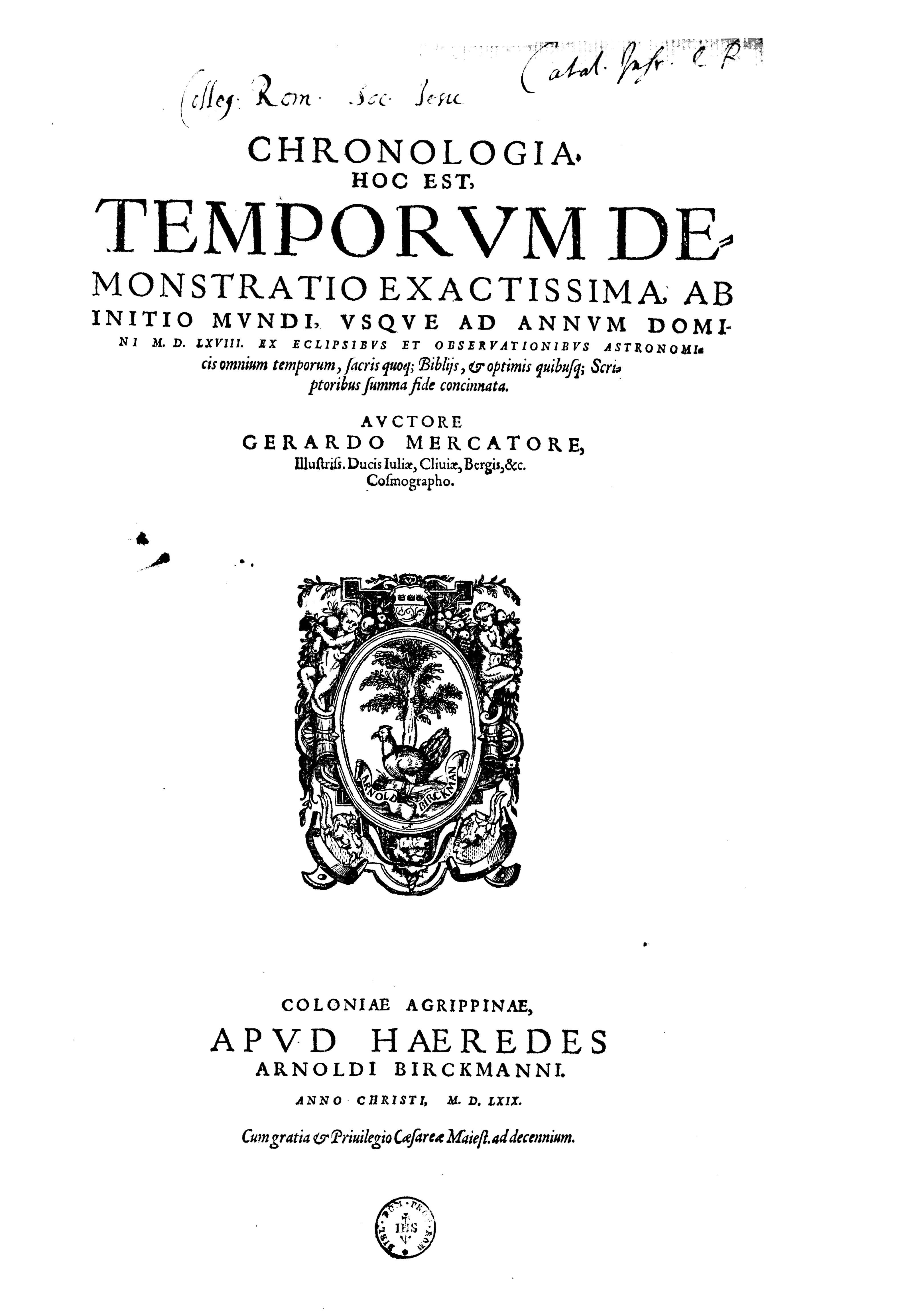 Chronologia. Hoc est temporum demonstratio exactissima, ab initio mundi, vsque ad annum Domini 1568. Ex eclipsibus et obseruationibus astronomicis omnium temporum, sacris quoque Biblijs, ... summa fide concinnata. Auctore Gerardo Mercatore, ... cosmographo. - Coloniae Agrippinae : apud haeredes Arnoldi Birckmanni, 1569. - [116], 340, [4] p. ; 2°. - A cura di Onofrio Panvinio, il cui nome appare nella prefazione. - VD16 K 2335 .